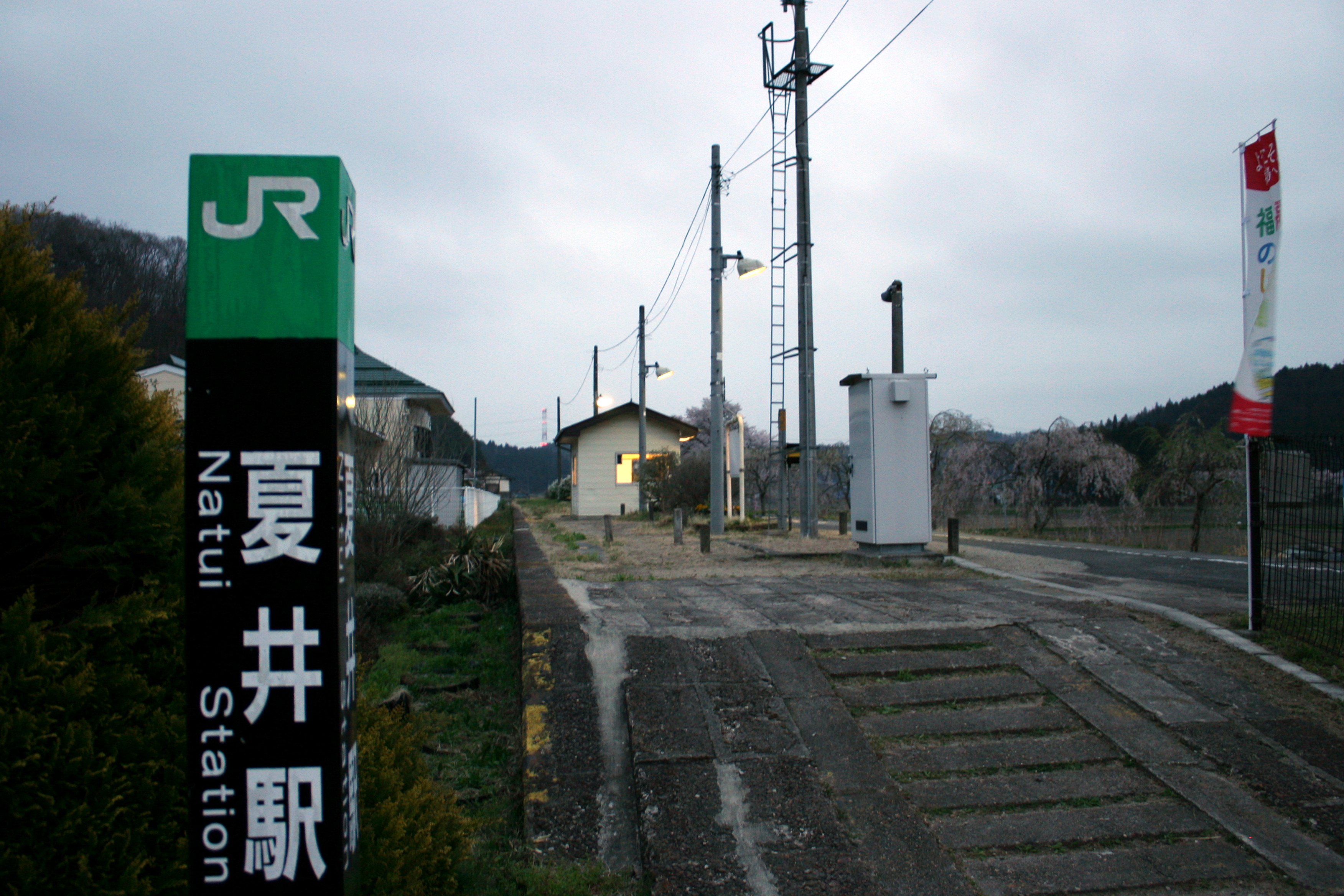 投稿者本人撮影